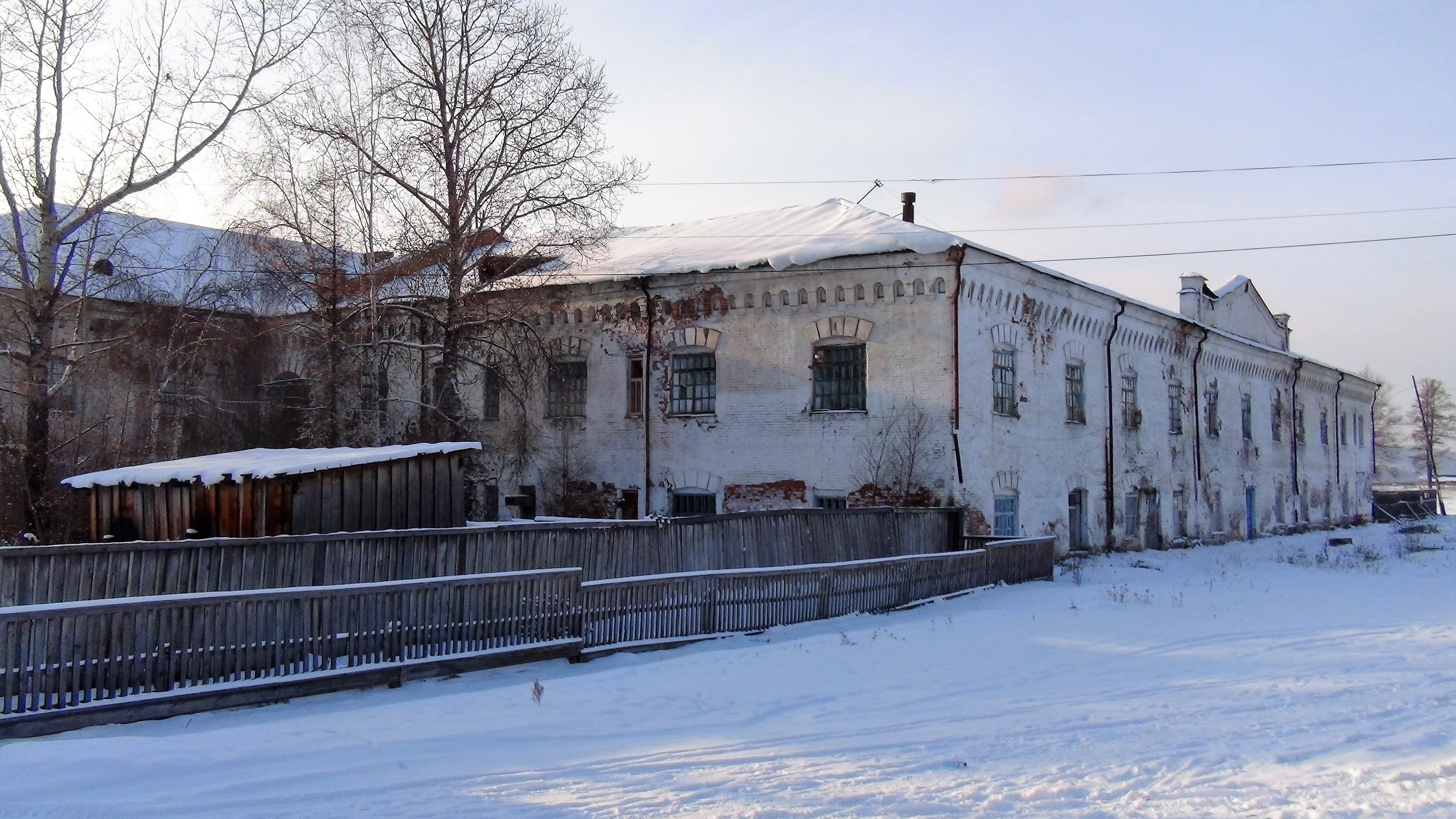 Александровский централ: Александровское, Боханский район, Иркутская область